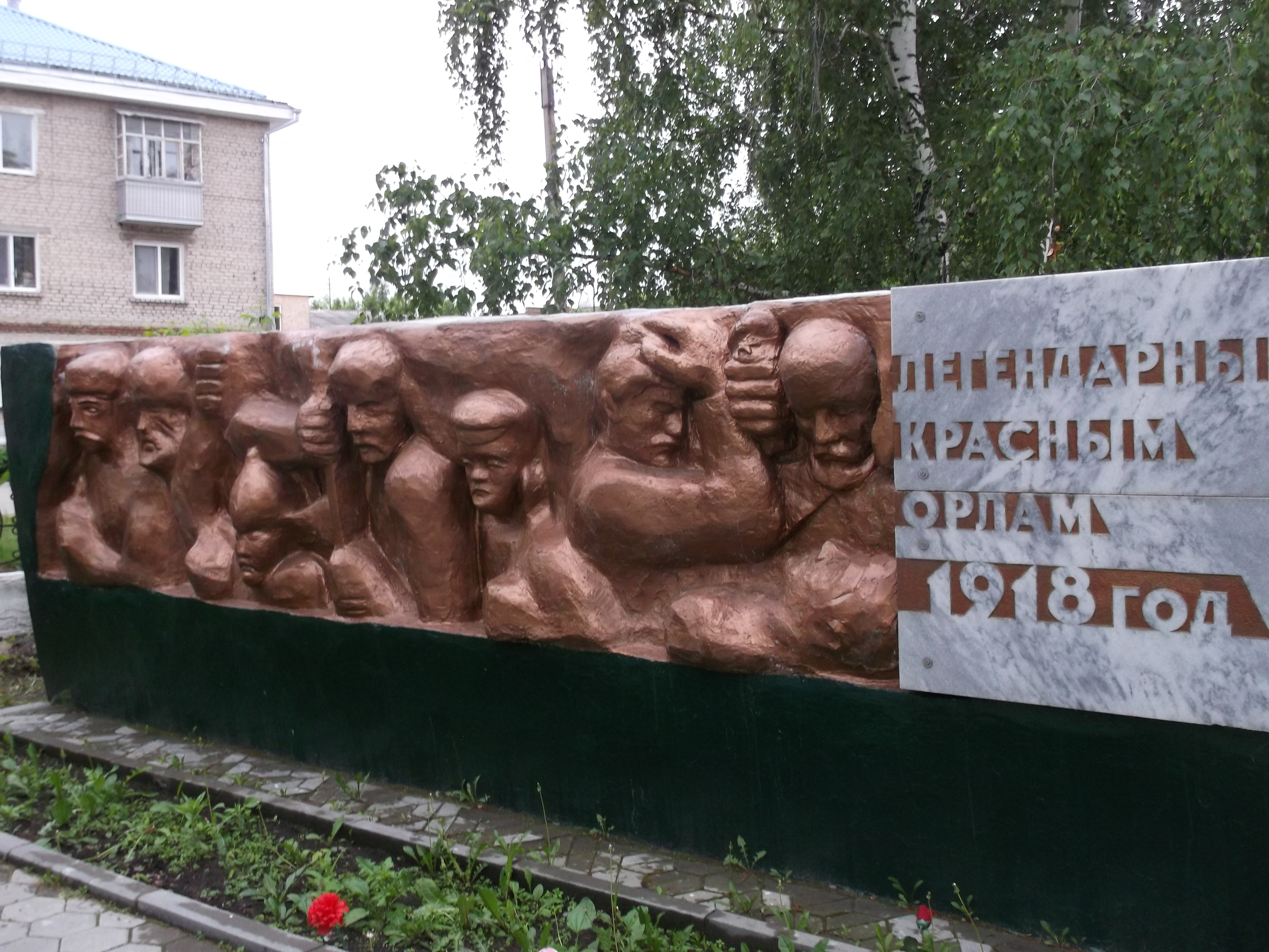 г. Катайск